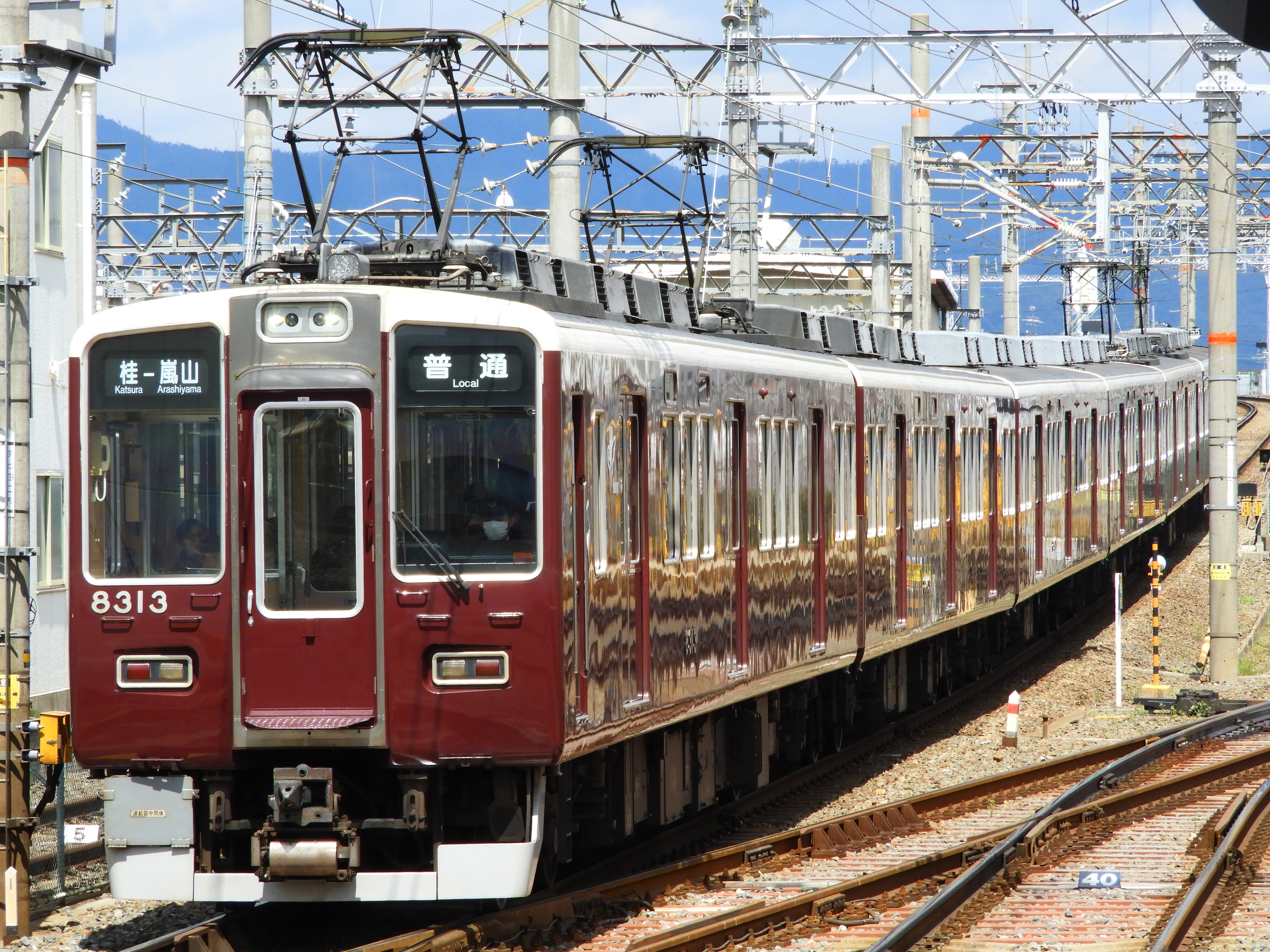 行楽期限定の阪急8300系6両編成による嵐山線普通の代走運用。桂駅にて Nikon Coolpix B700